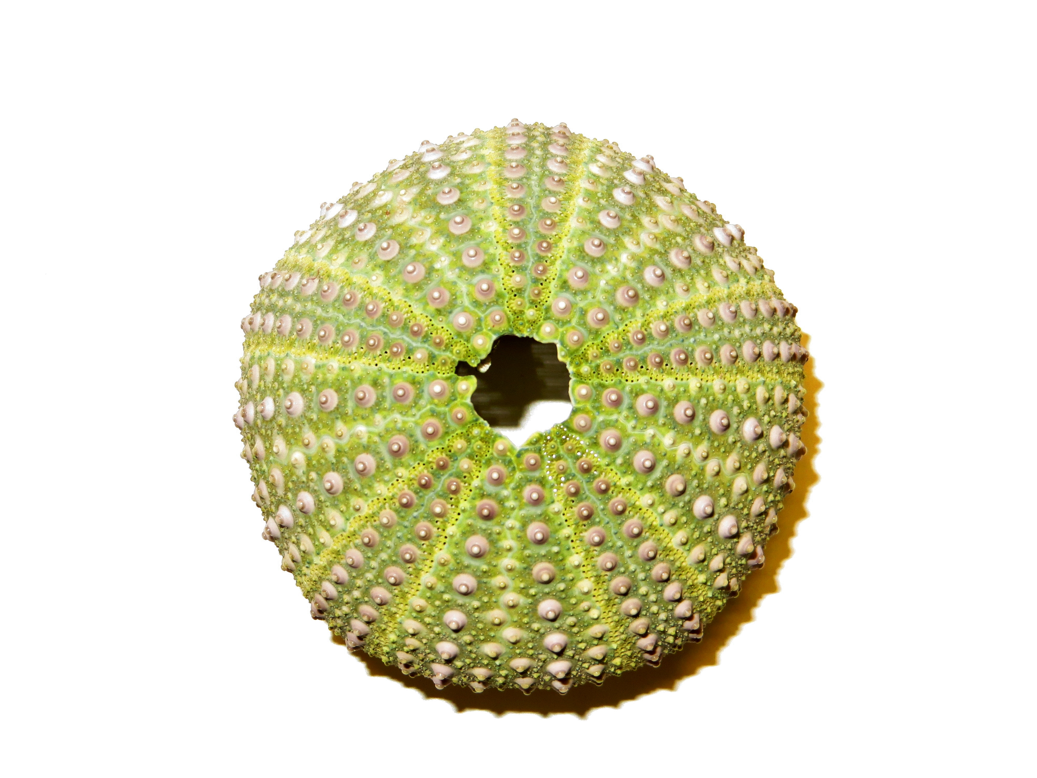 Test (squelette) d'oursin violet Paracentrotus lividus, récolté en Méditerranée.